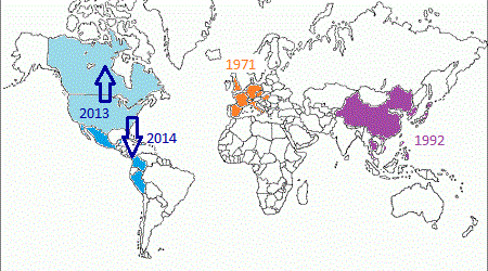 Distribució geogràfica mundial al llarg del temps del PEDV